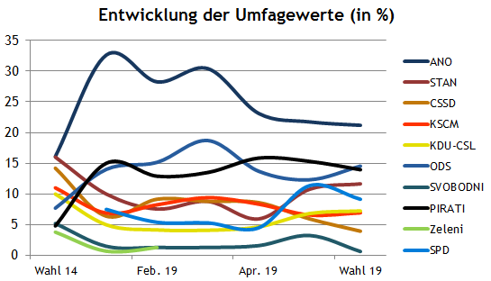 Europawahl 2019 Umfragen Tschechien